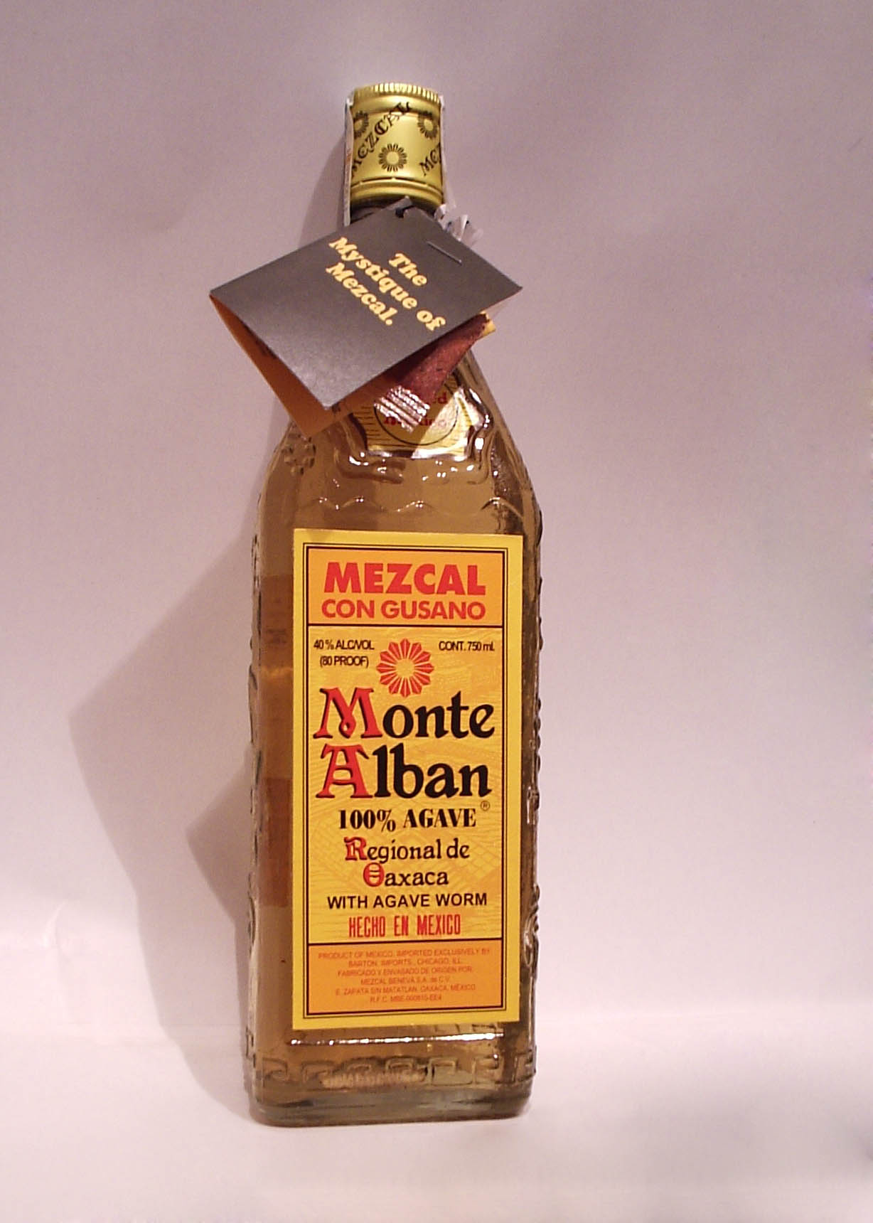 Bottle of Mezcal "Monte Alban", Мескаль «Монте Албан»